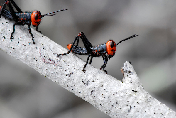 "Gafanhoto-soldado (Chromacris speciosa) fotografado em Guarapari, Espírito Santo - Sudeste do Brasil. Bioma Mata Atlântica. Registro feito em 2007. ENGLISH: Grasshopper photographed in Guarapari, Espírito Santo - Southeast of Brazil. Atlantic Forest Biome. Picture made in 2007."